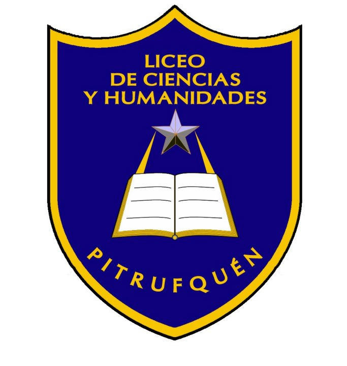 Escudo liceo de Pitrufquén estilizado y de mejor resolución.